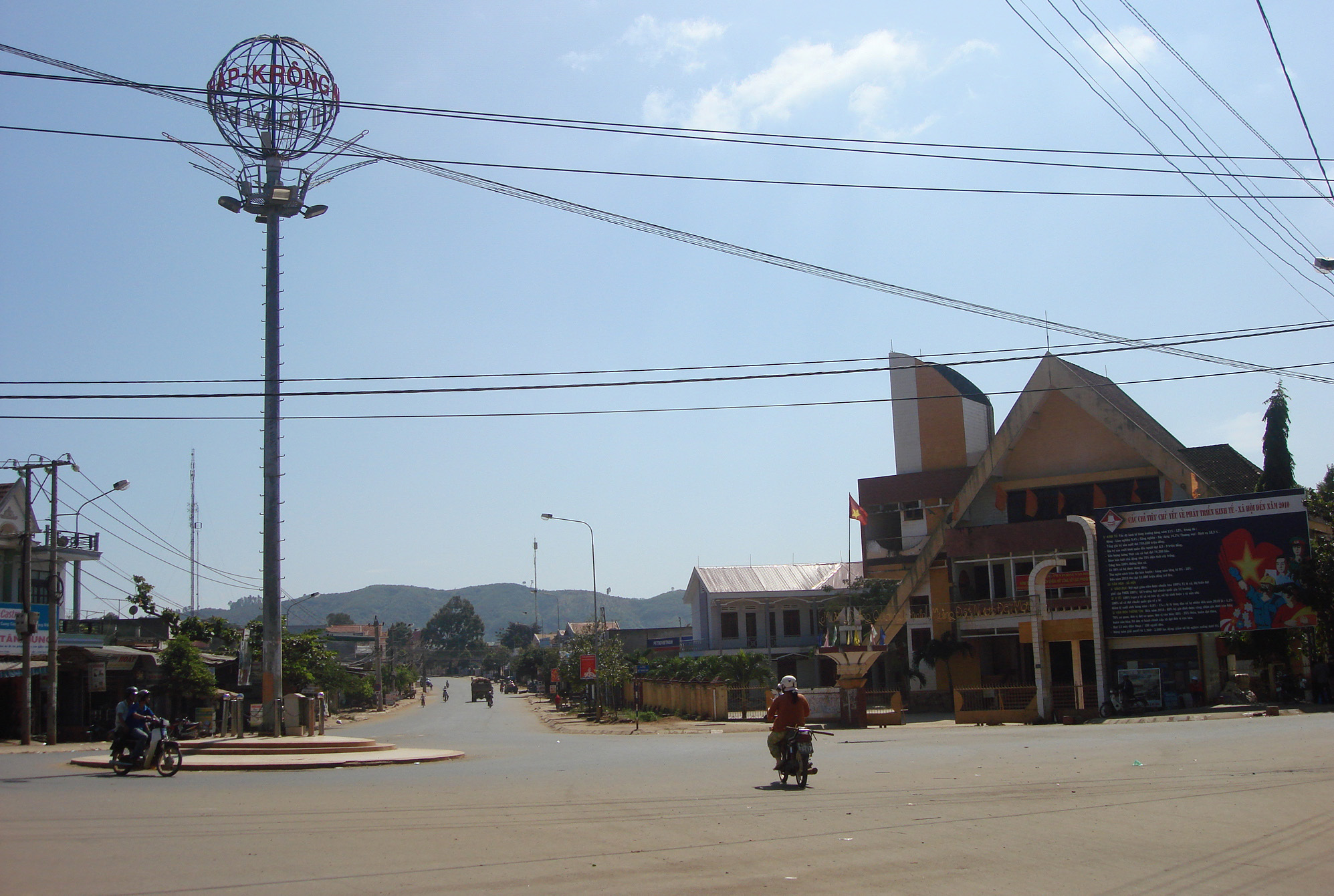 Trung tâm thị trấn Buôn Trấp, huyện Krông Ana, tỉnh Đắk Lắk